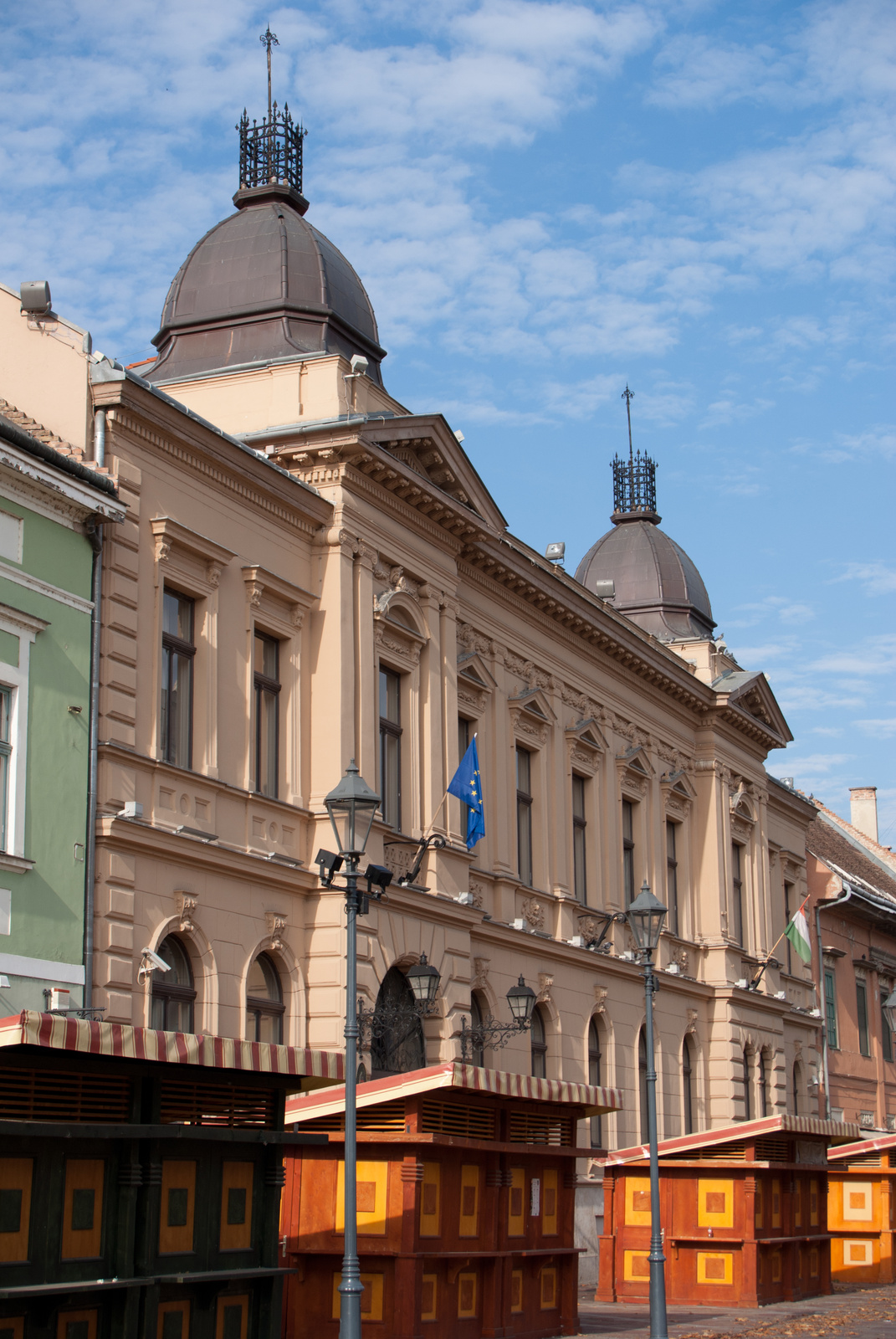 v. Járásbíróság (Esztergom, Széchenyi tér 22.) This is a photo of a monument in Hungary, Identifier: 6259